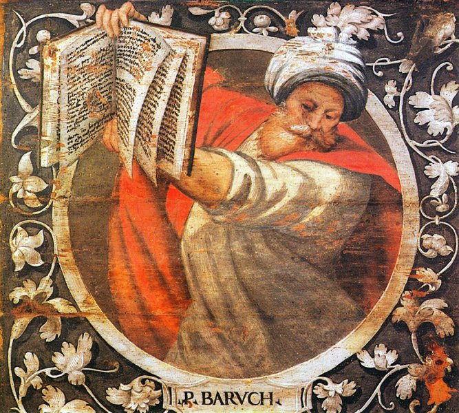 Profeta Baruch - Lacunare proveniente da chiesa di san Giovanni Gemona del Friuli (UD) 131 x 145 cm Museo Civico di Gemona